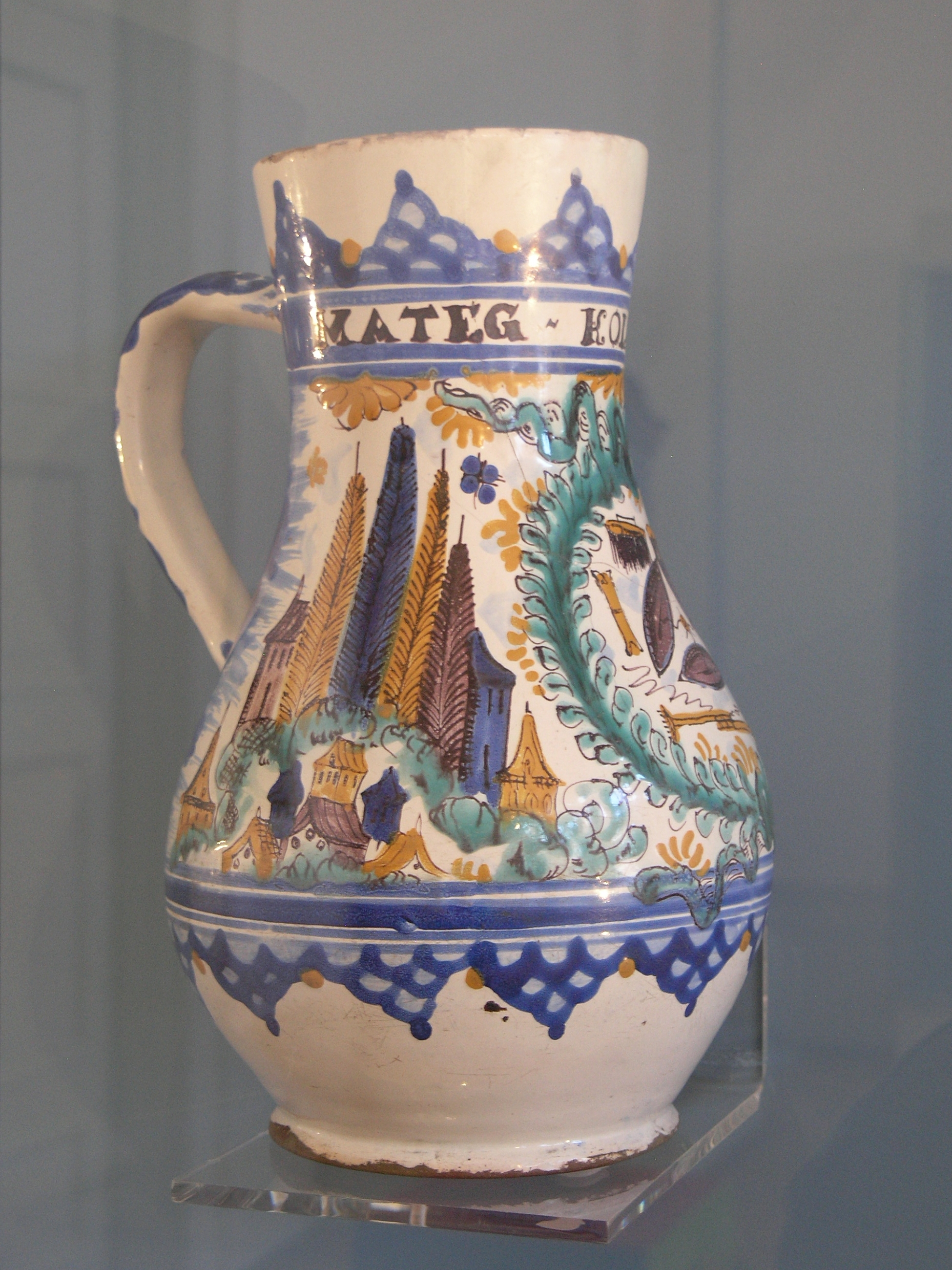 Fajánsový džbán mistra tkalcovského cechu, datovaný rokem 1732 (Morava) Project: Lidová tvořivost